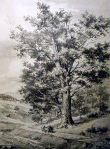 Airlenbacher Eiche